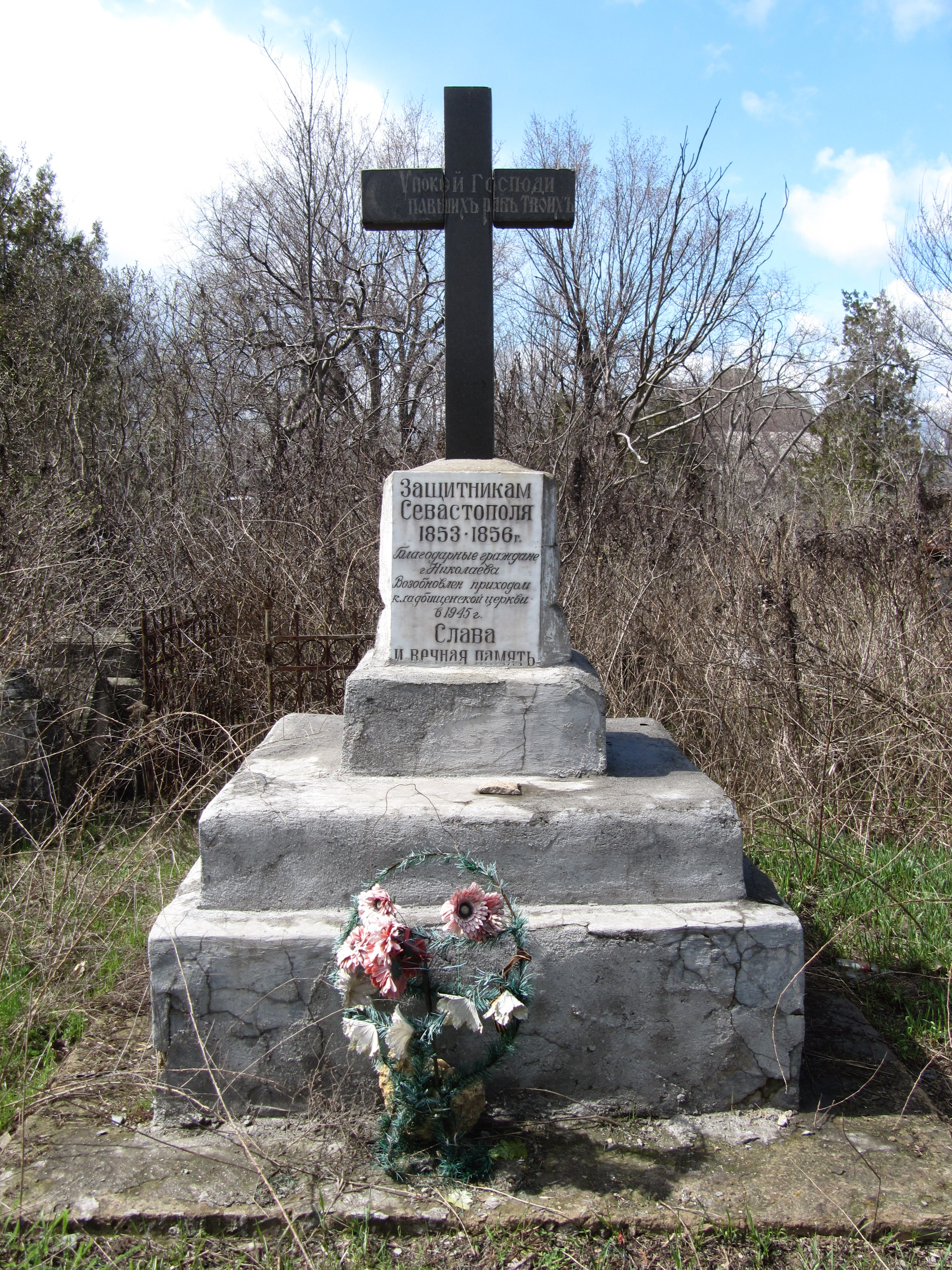 Братська могила захисників Севастопля 1853-1856 рр. (м. Миколаїв, Миколаївський некрополь) Миколаївська весна у Вікіпедії